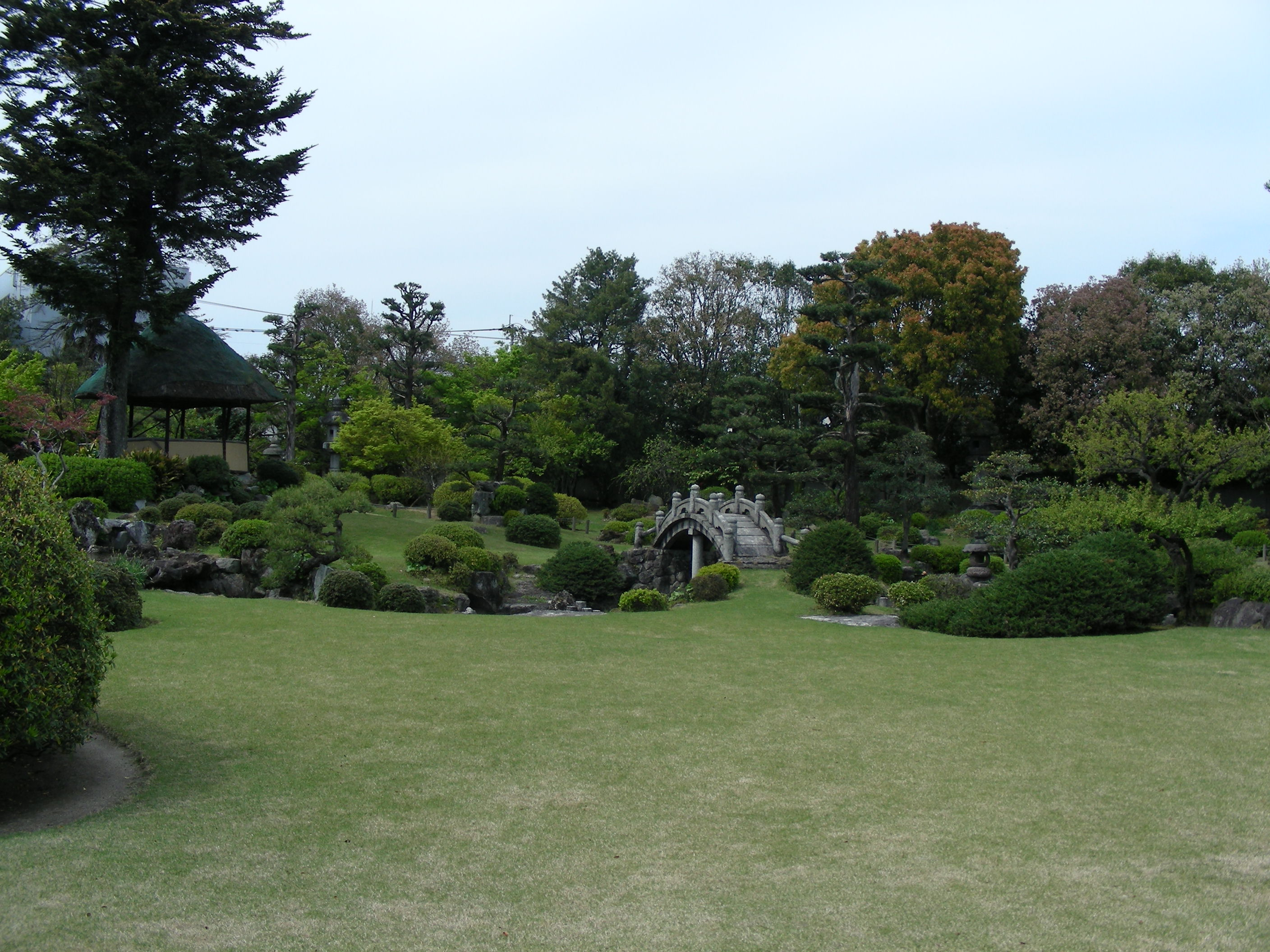 福岡県飯塚市幸袋の旧伊藤伝右衛門邸の庭。2014年4月撮影。